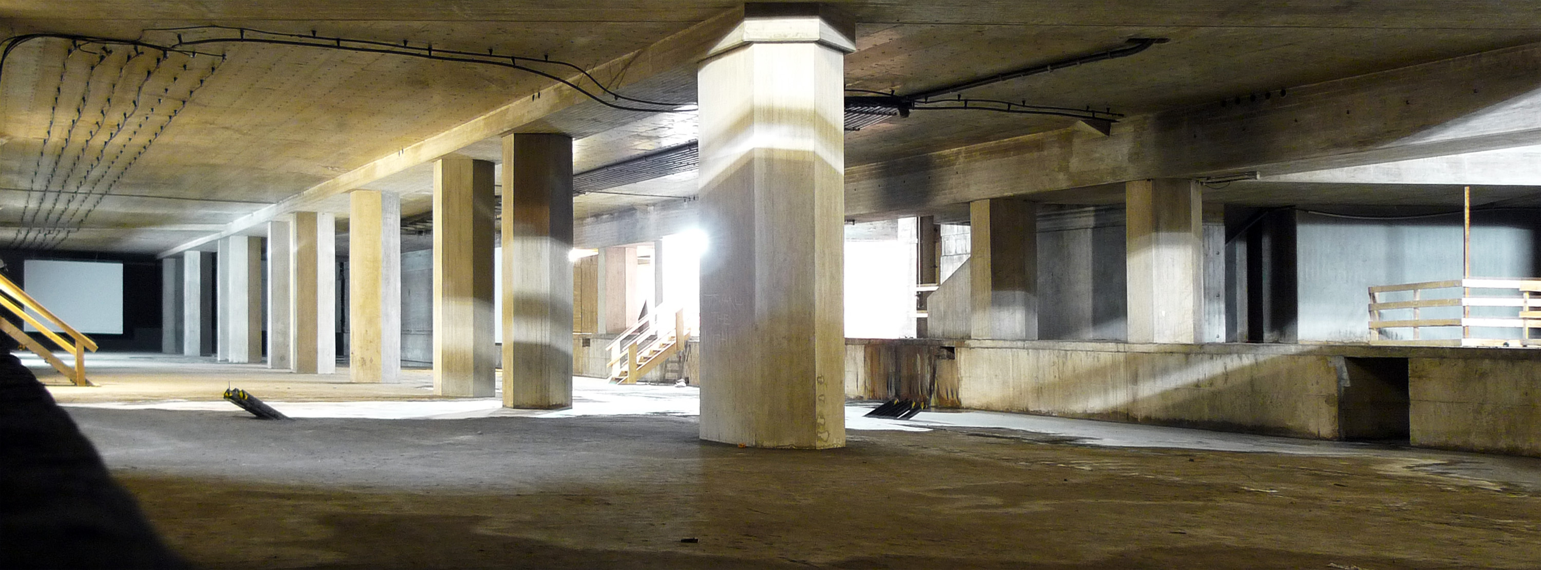 U-Bahn Station (Rohbau) am Hauptbahnhof in Hannover ("Geisterstation"), welche sich noch unter der bereits im Betrieb befindlichen Station für die Linien A und B befindet. Bauvorleistung für die geplante unterirdische Linie D.